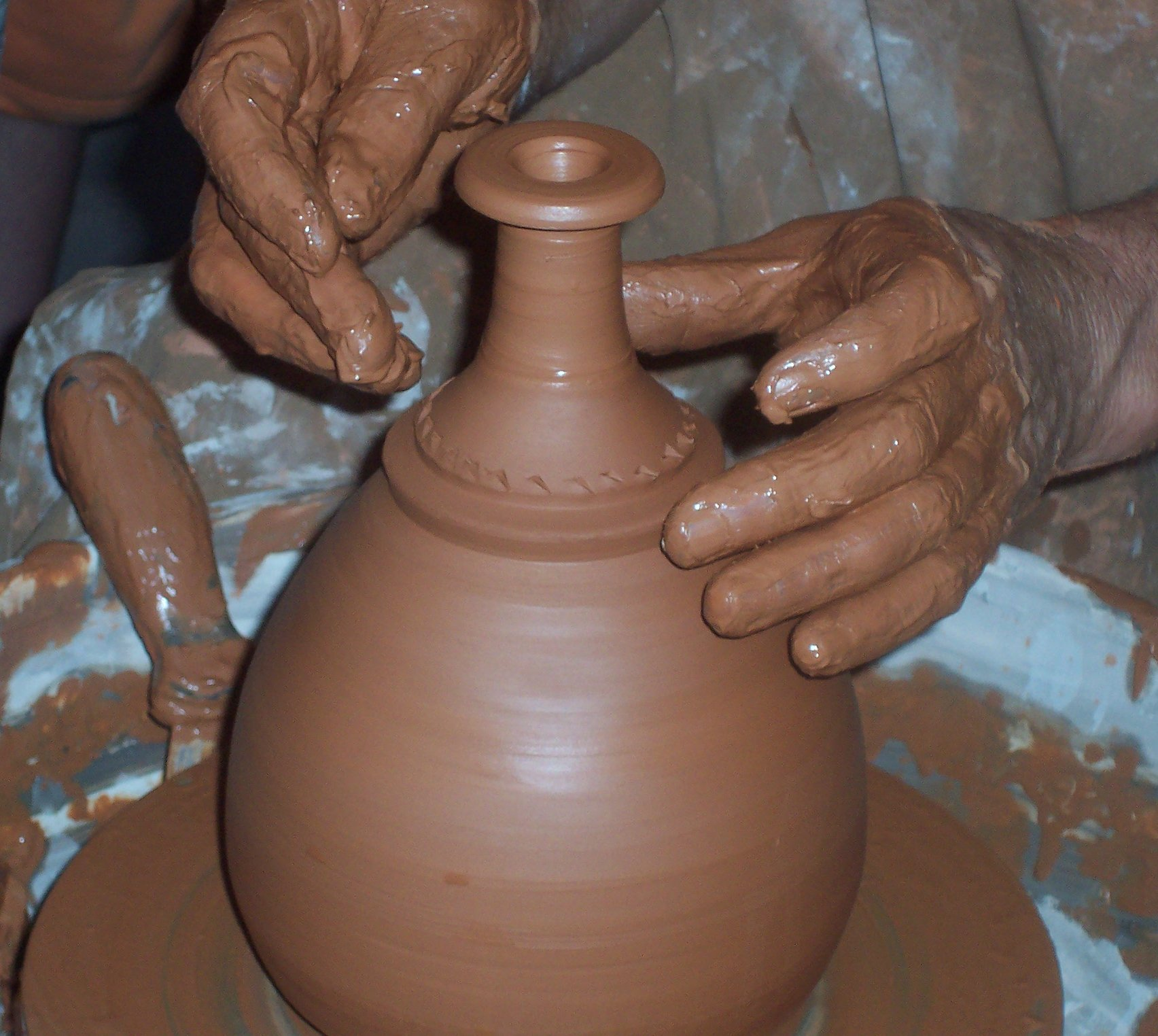 Mans e Barro. Alfareiro en Niñodaguia, Xunqueira de Espadanedo